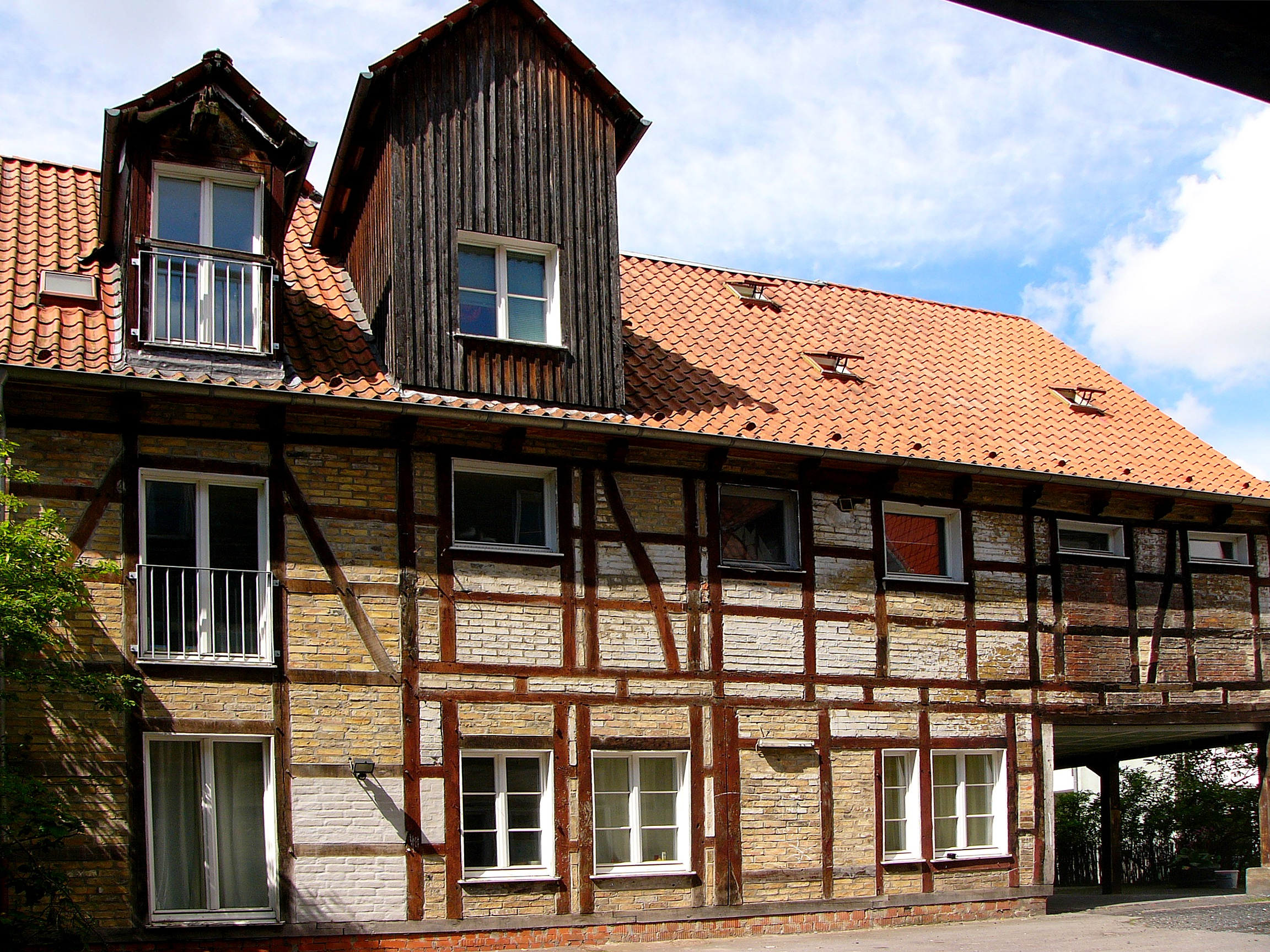 Mühle Koch Haupt-u. Mühlengeb.This is a photograph of an architectural monument., no. 132